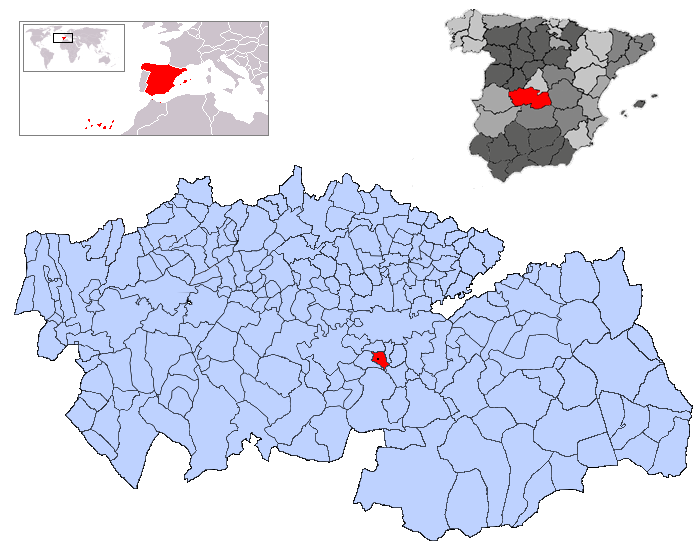 Layos en la provincia de Toledo